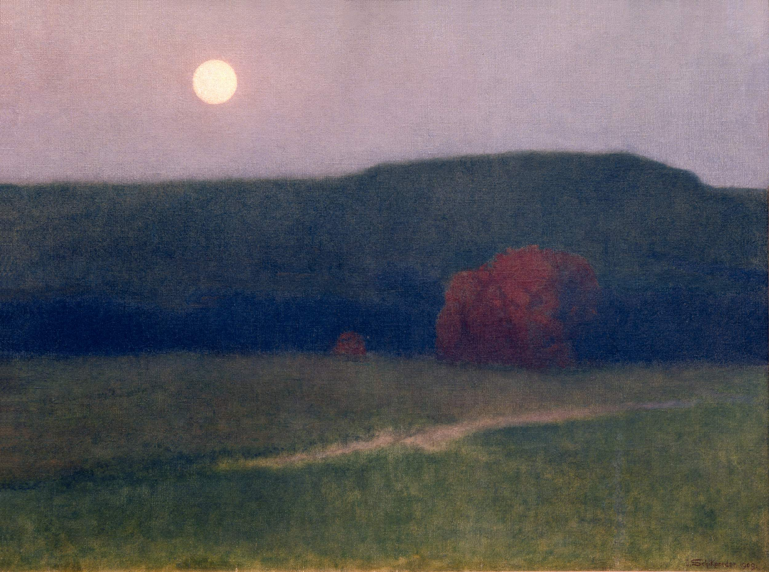 Stmívání